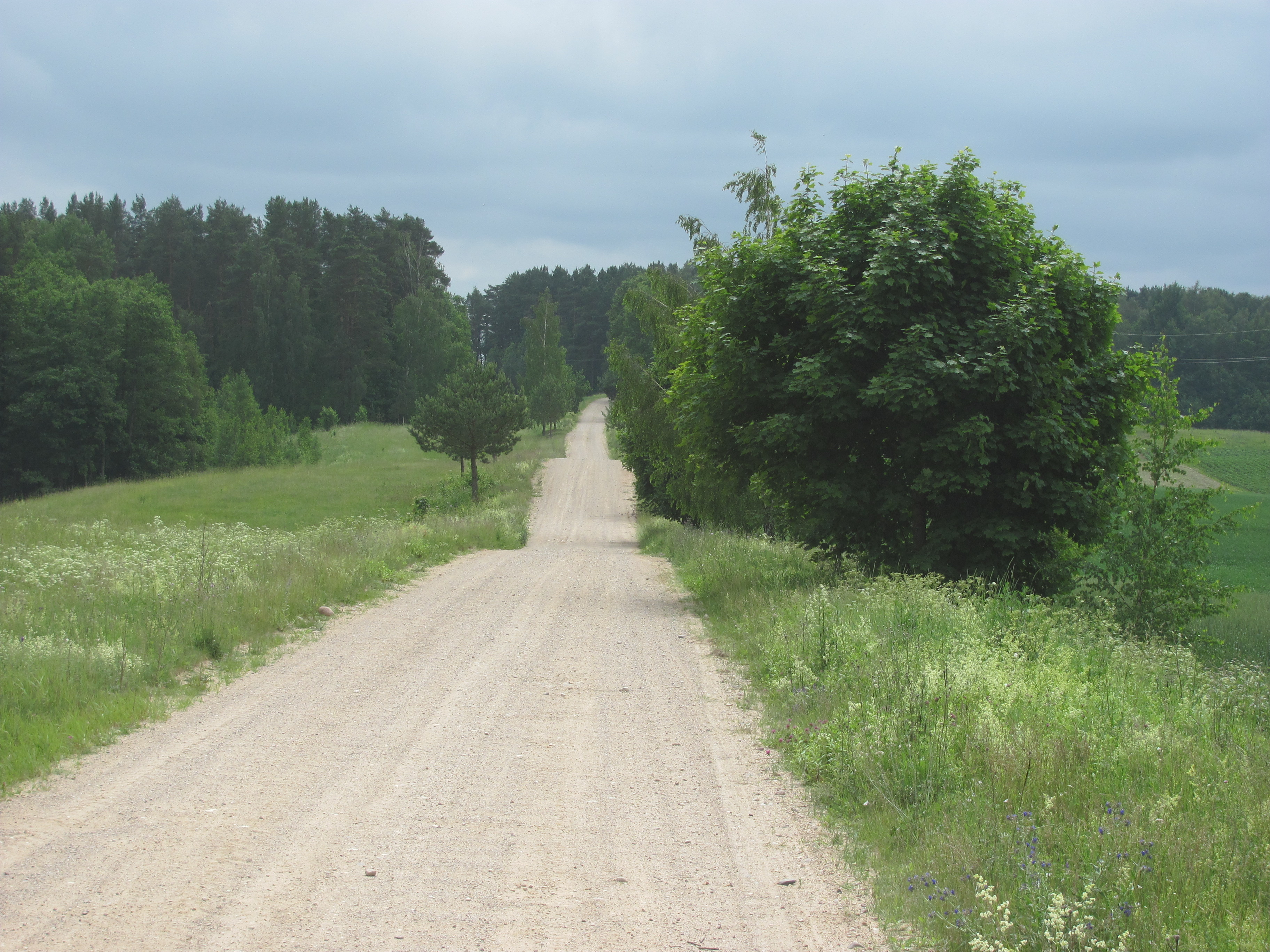 Imbrado sen., Lithuania